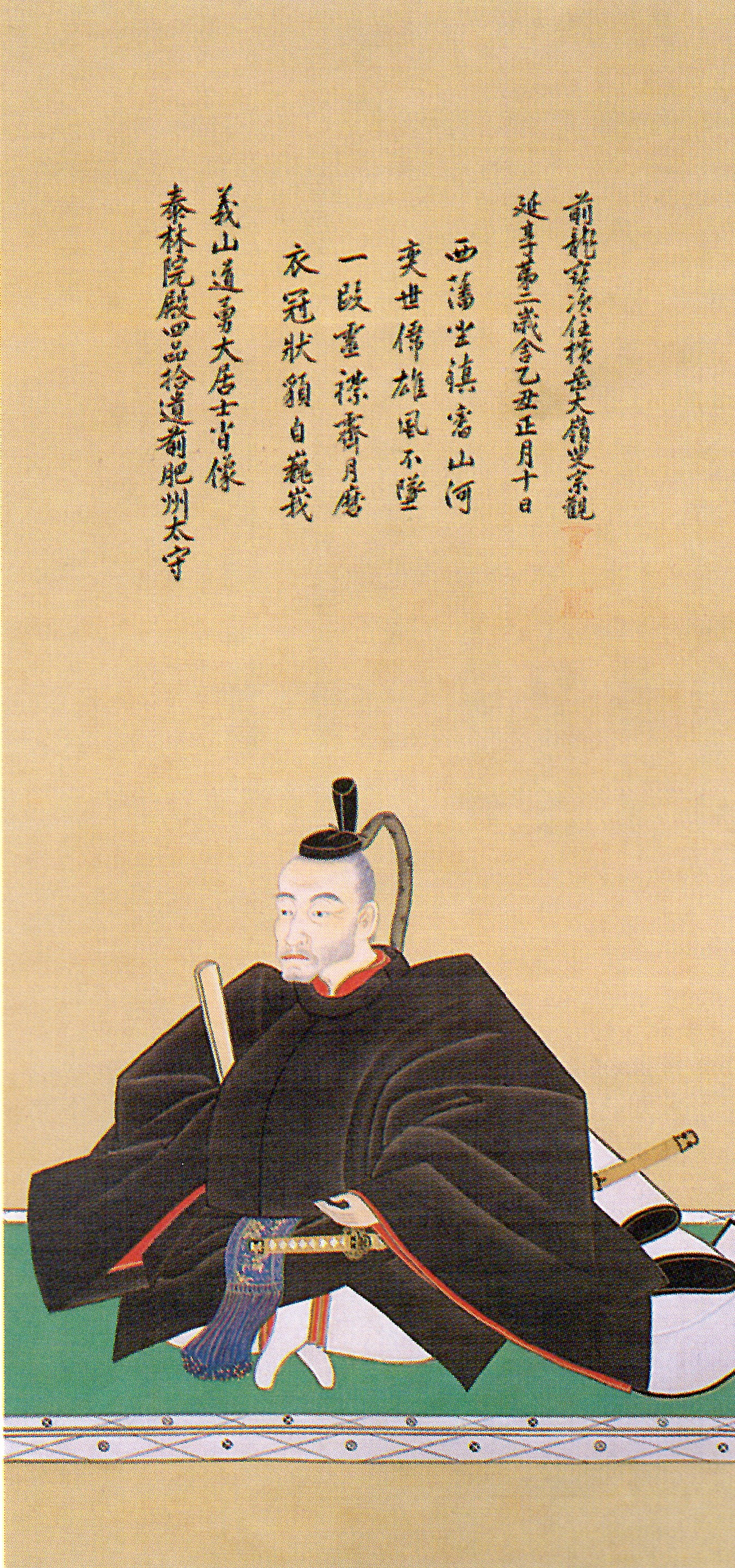 黒田宣政の肖像。